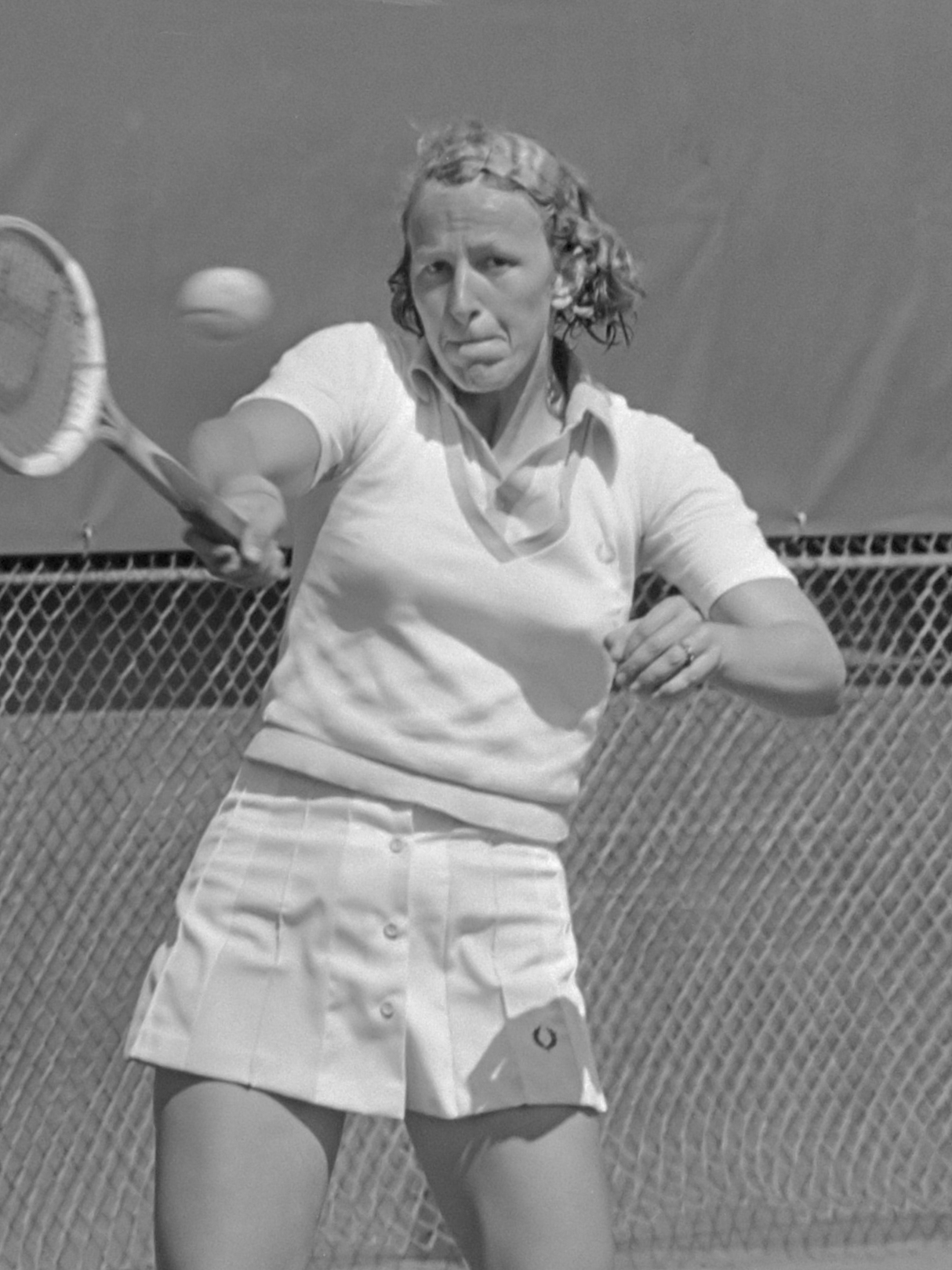 Nationale tenniskampioenschappen in Schevingen; mejuffrouw T. Zwaan in actie 14 augustus 1974